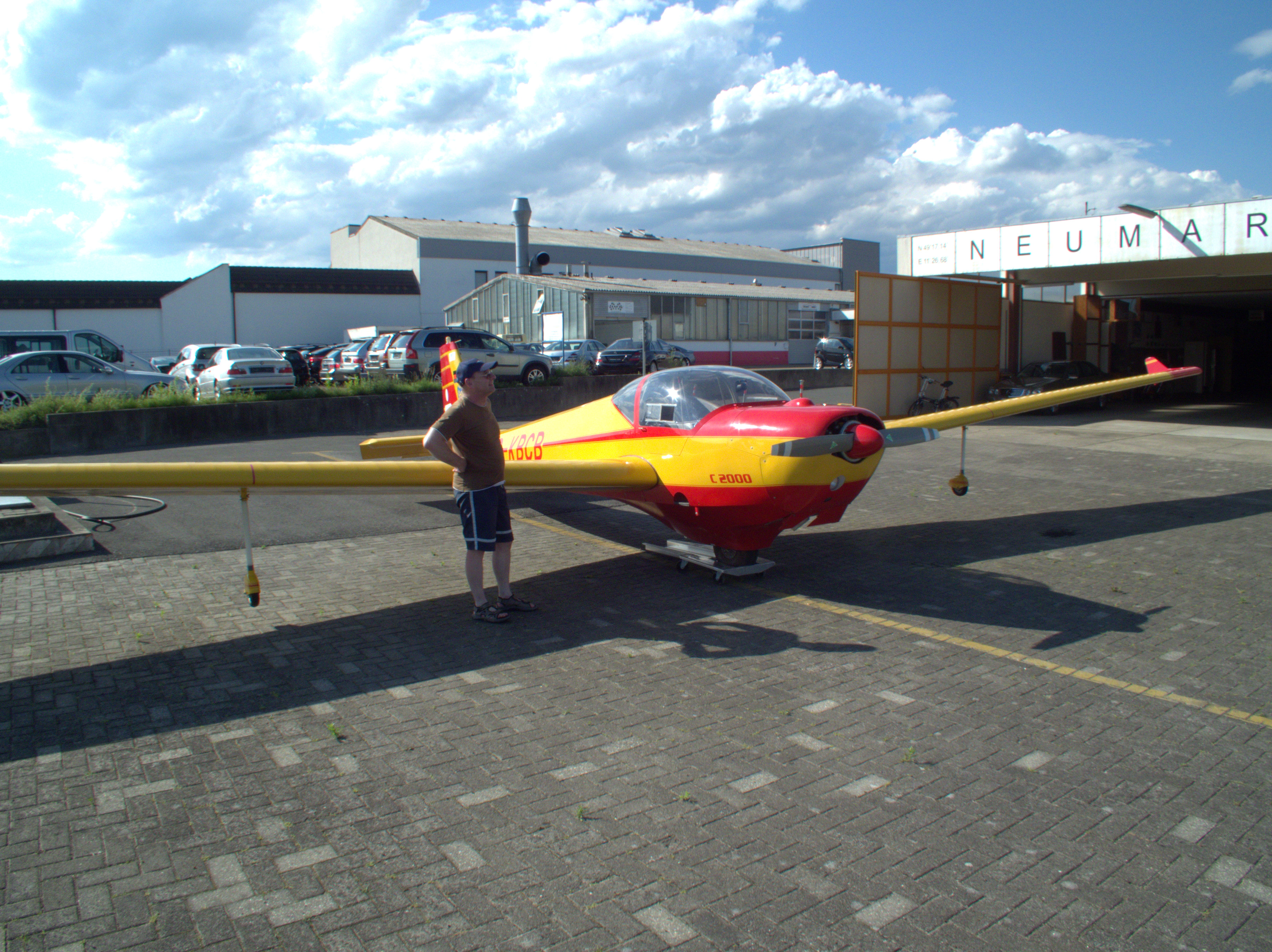 Flugplatz Neumarkt in der Oberpfalz am der Nürnberger Straße